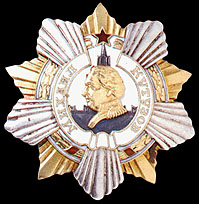 Vrij van copyright want Sovjetrussisch van voor 1973. Van de Duitse Wiki.